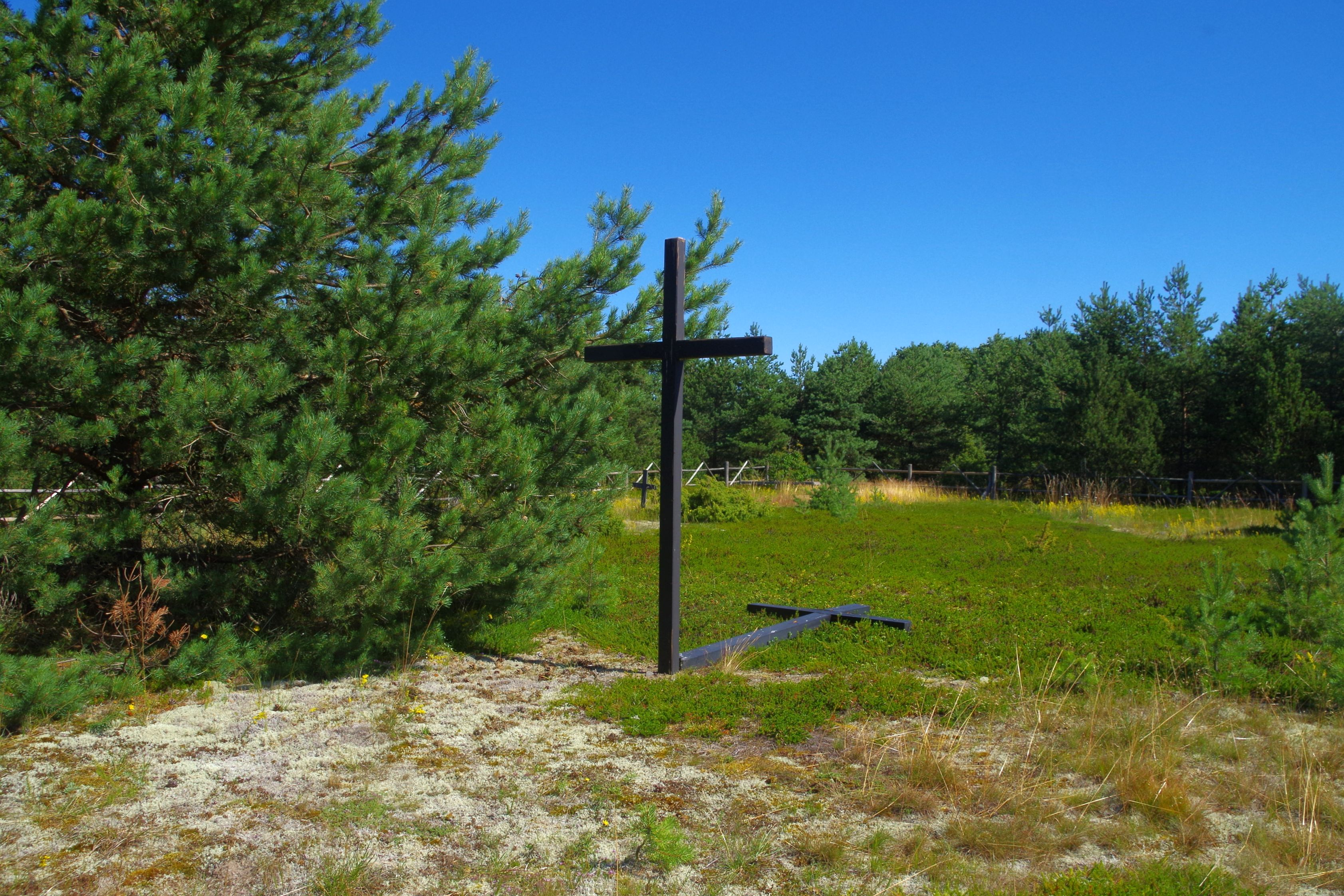 Rammu saare kalmistu